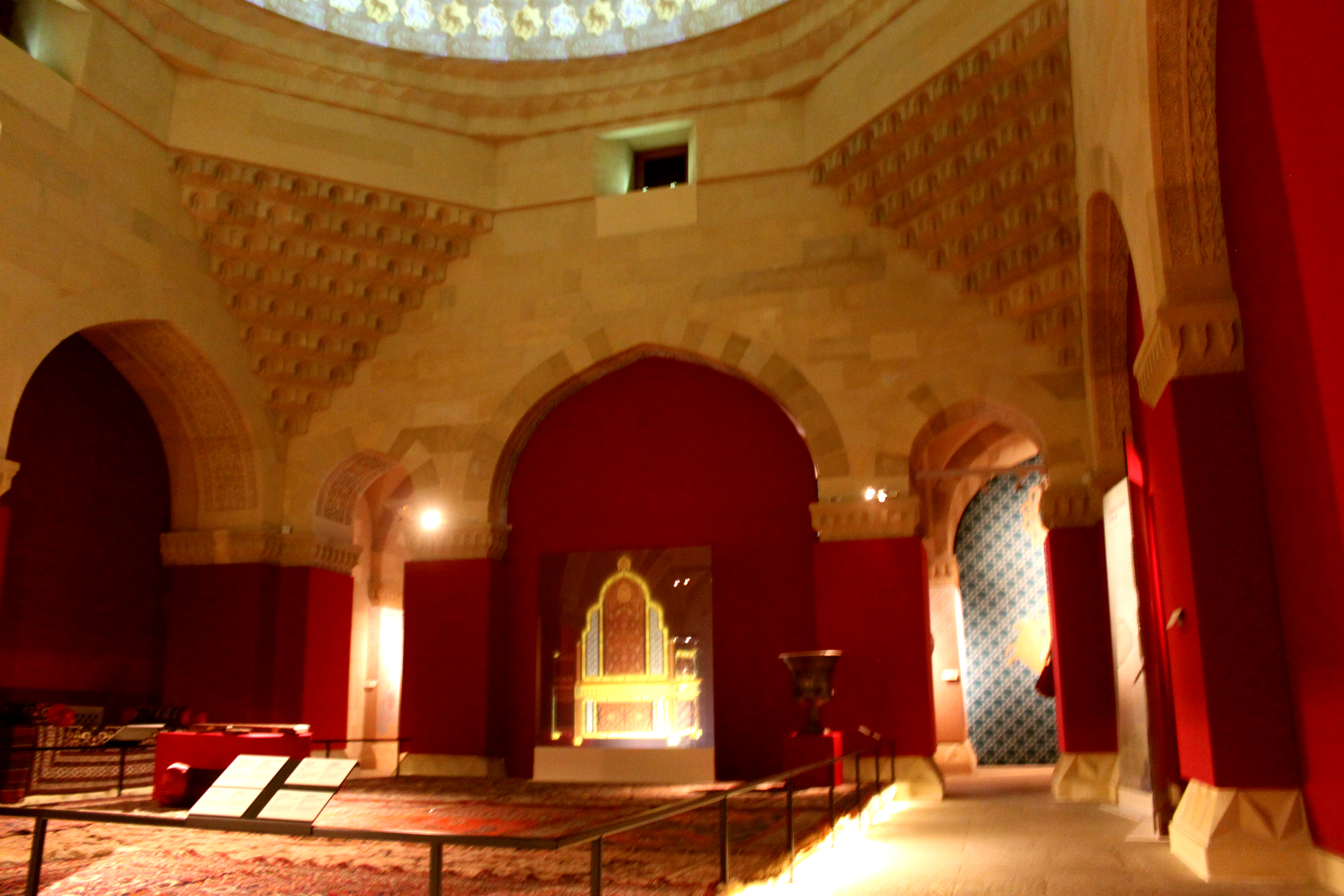 Şirvanşahlar sarayında Taxt zalının interyeri